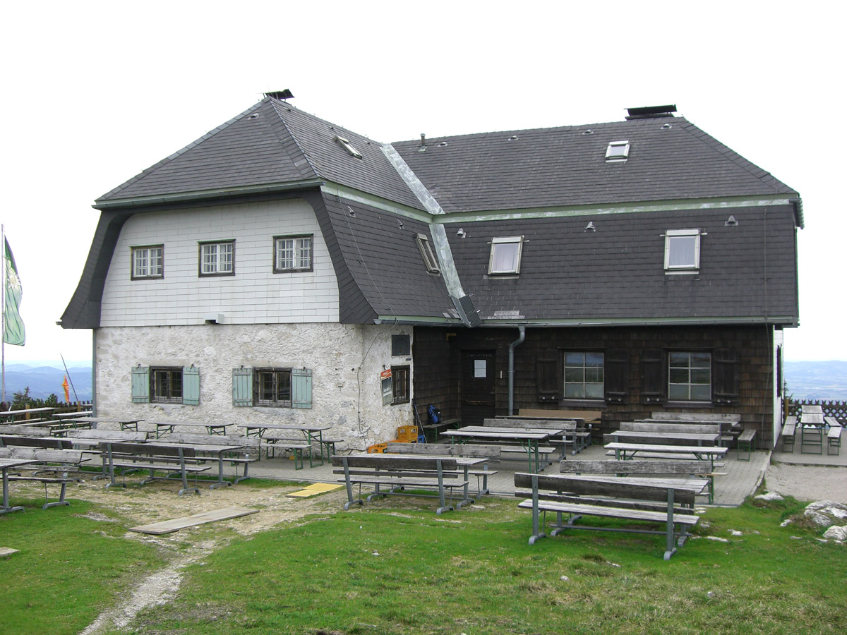 Hochleckenhaus im Höllengebirge